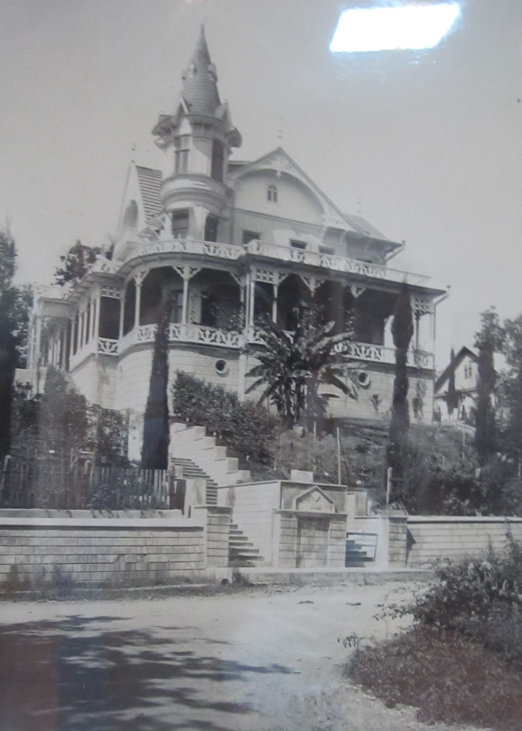 Вилла Якобсона, Сочи. До 1914. Фотография использована для открытки Издания писчебумажного магазина «Труд»